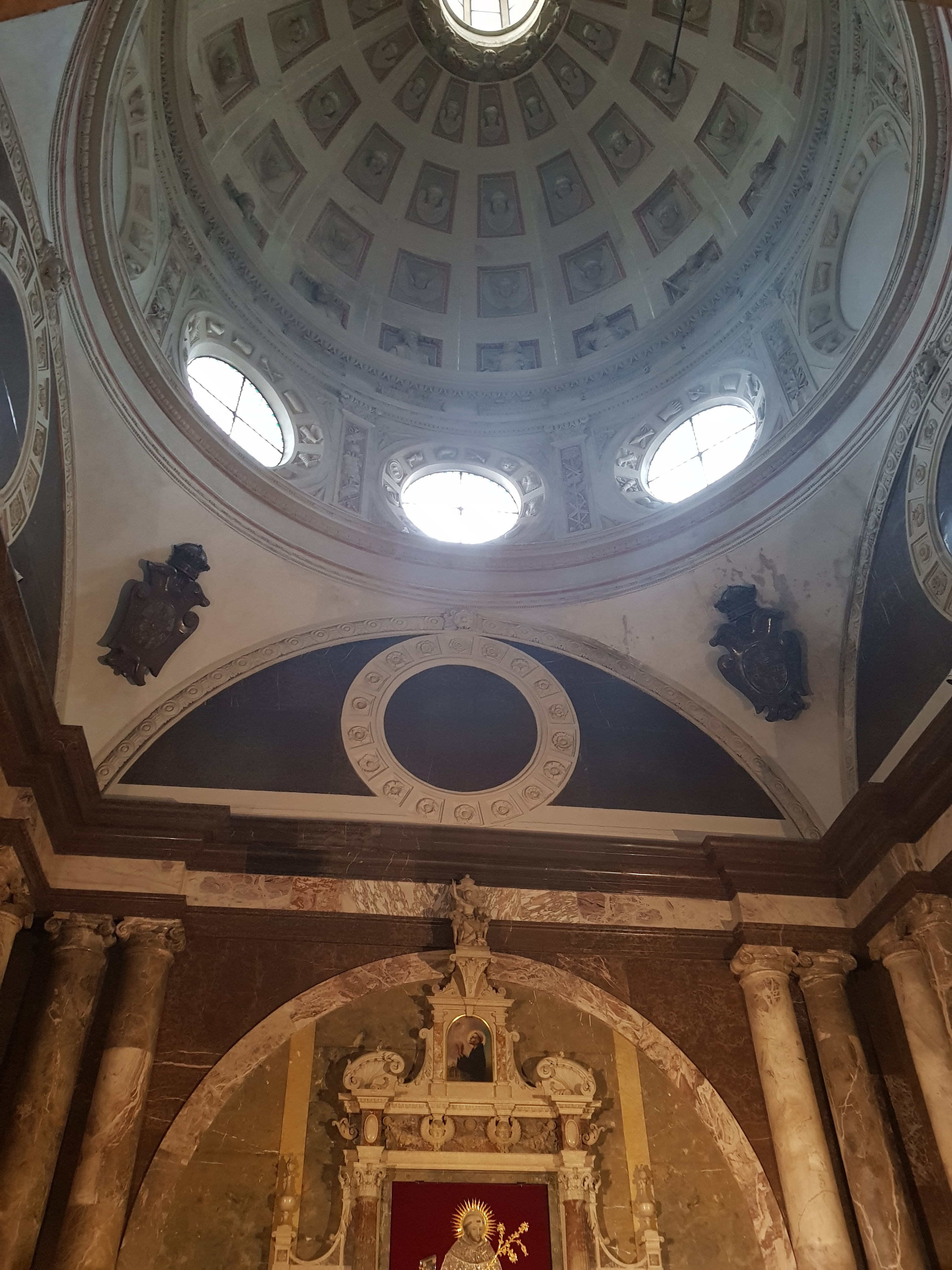 Kopuła w kaplicy rodu Myszkowskich w kościele Dominikanów w Krakowie